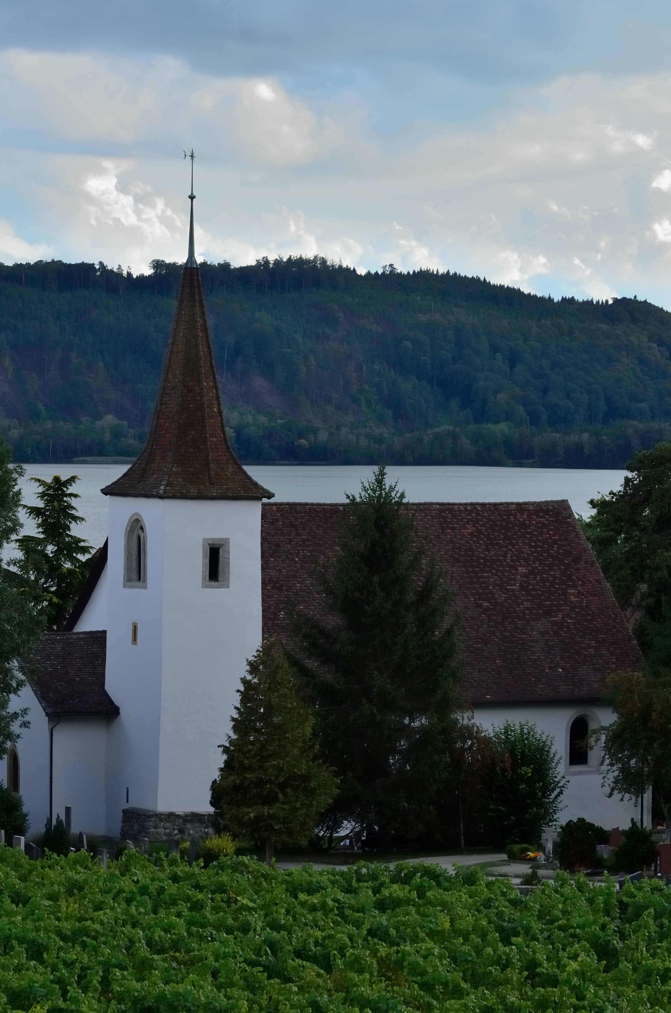 Blanche Eglise, La Neuveville